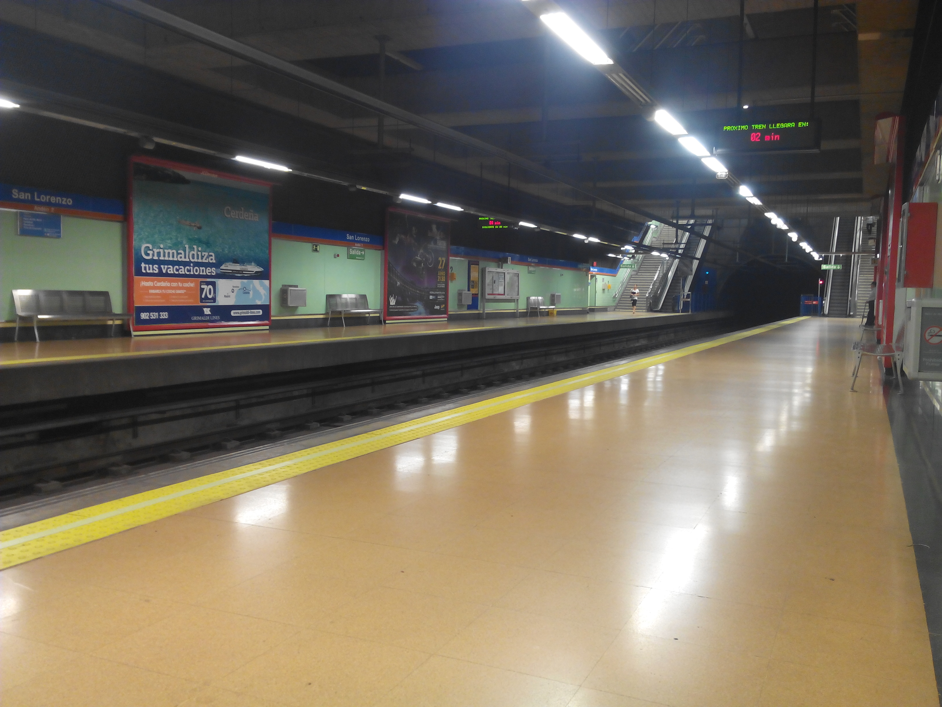 Estación de metro San Lorenzo (Metro de Madrid).